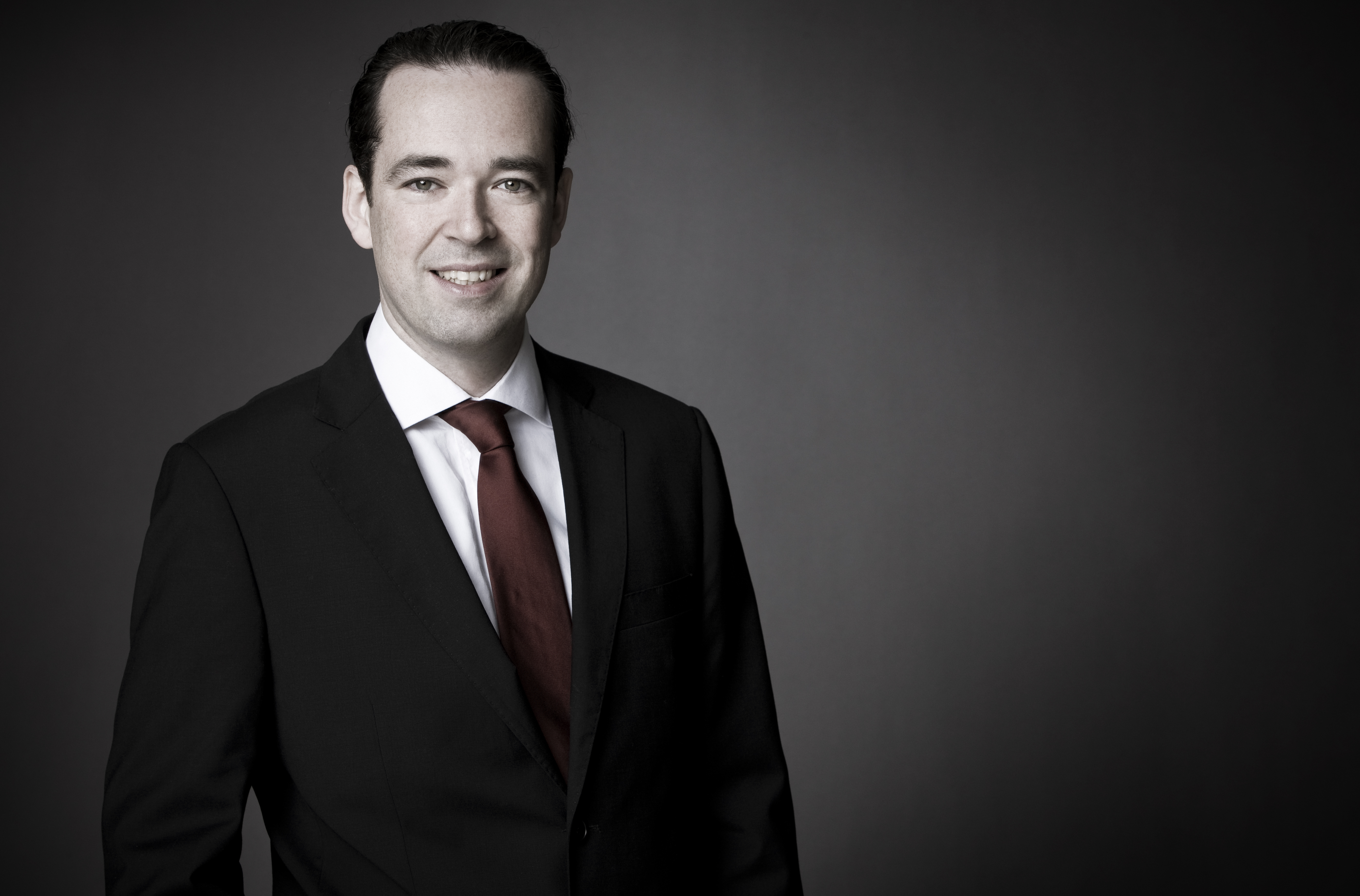 Portrait des deutschen Pianisten Michael Theede